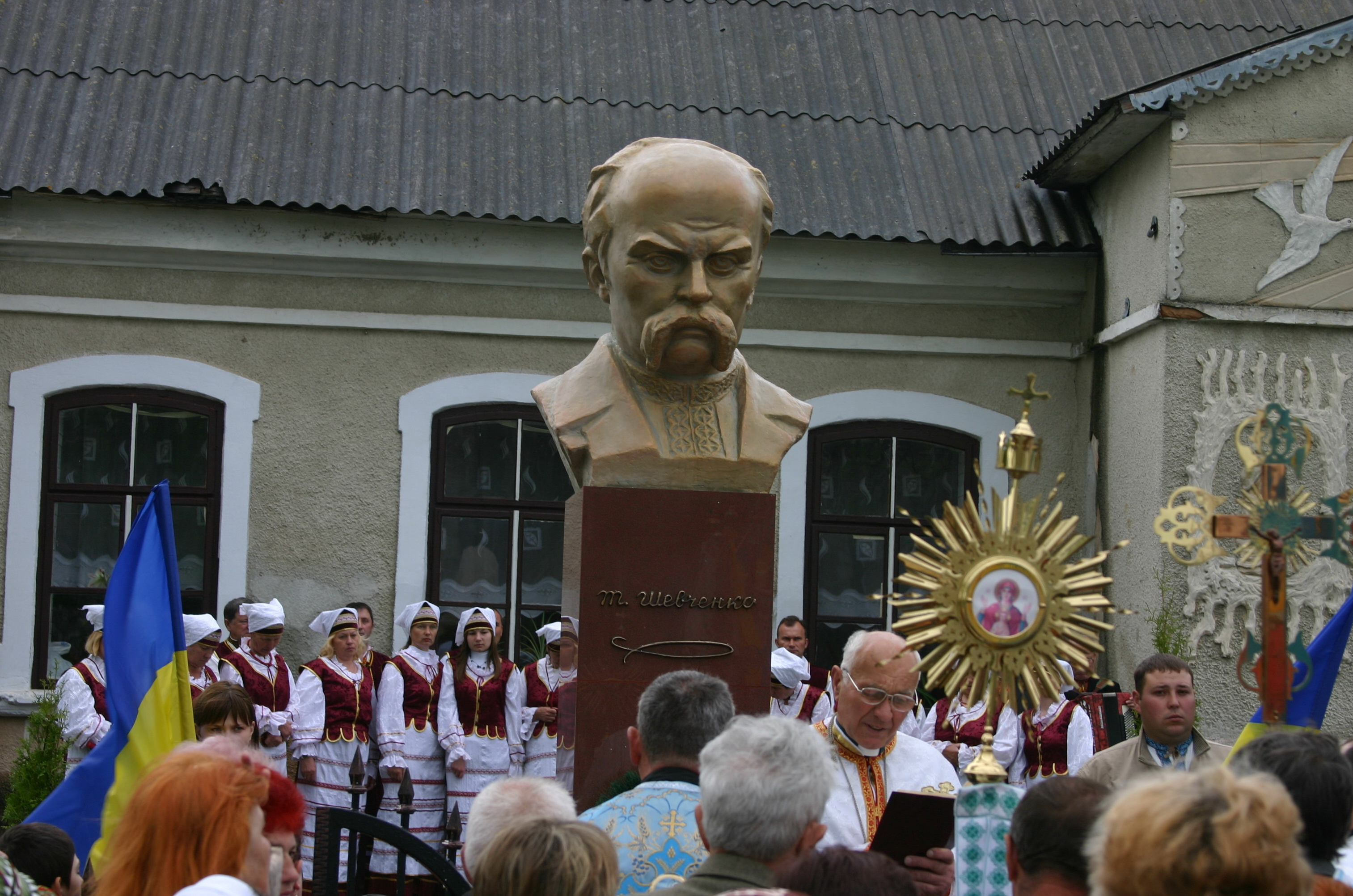 Romanivka_T.Shevchenko_2010.jpg: Відкриття пам. Т.Шевченку в Романівці